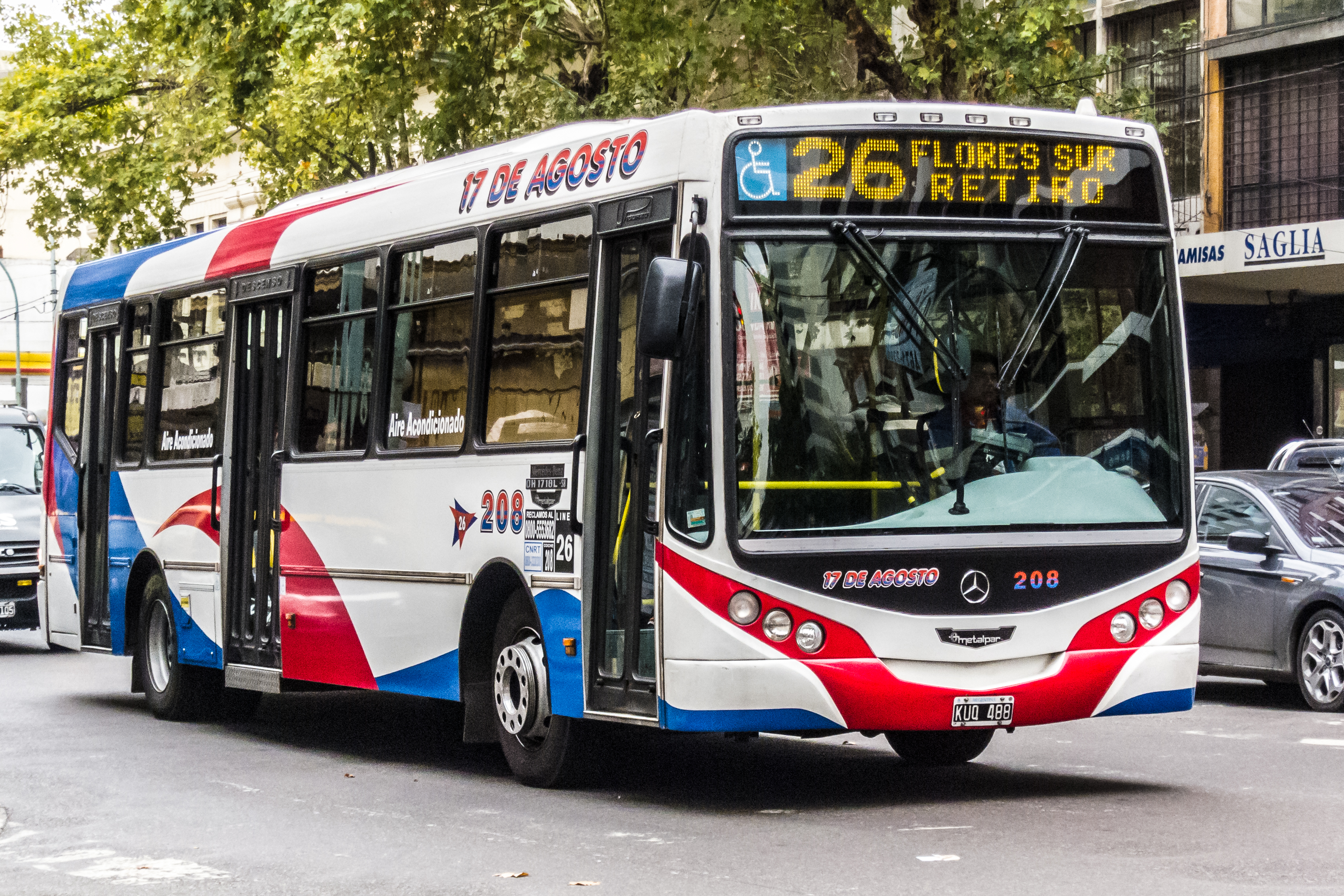 Colectivo de la Línea 26, interno 208, carrocería Metalpar Iguazú, chasis Mercedez-Benz OH 1718L-SB, matrícula KUK488. Buenos Aires, Argentina.